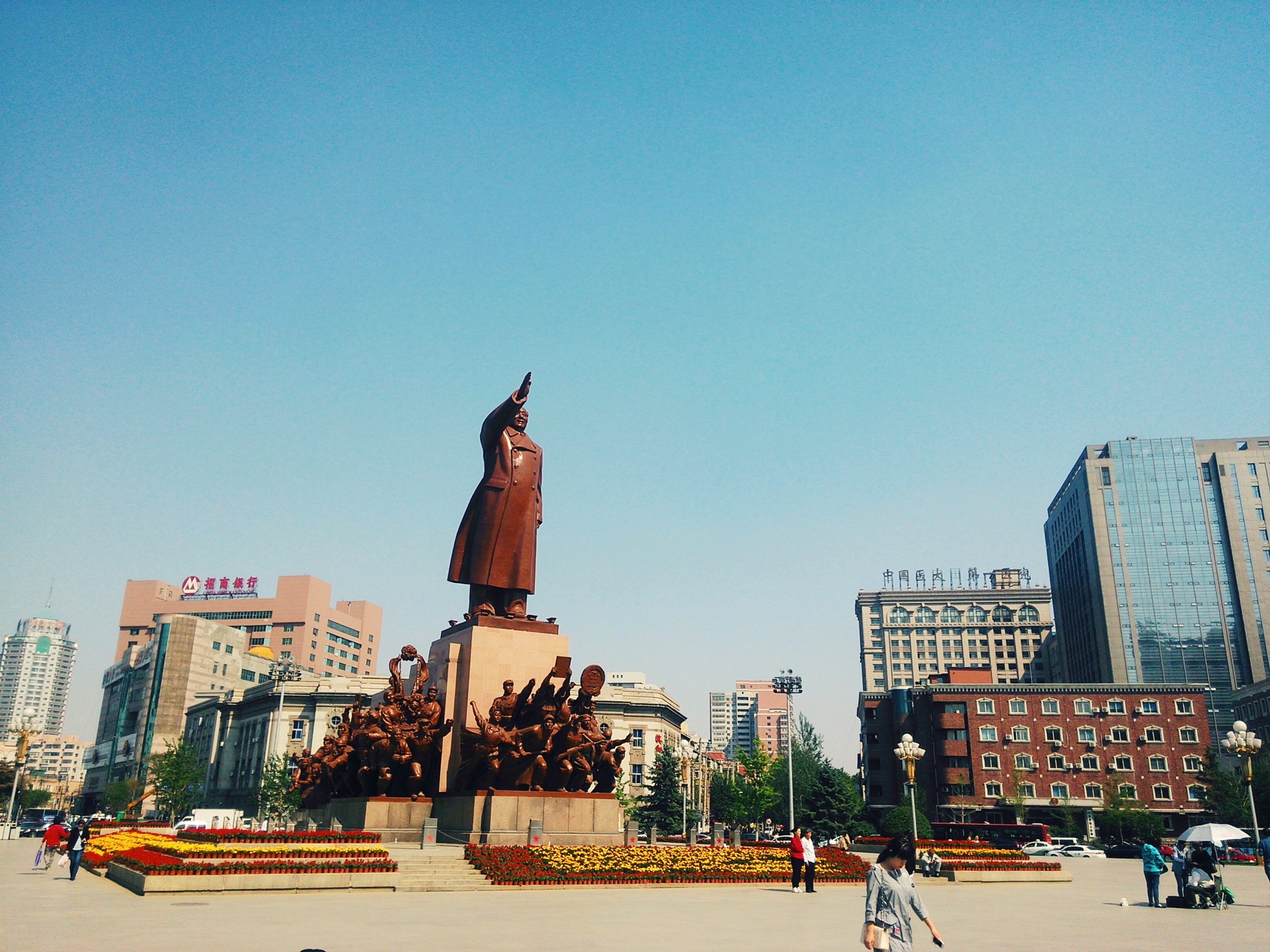 中文（中国大陆）: 坐落于沈阳中山广场中心的毛泽东塑像